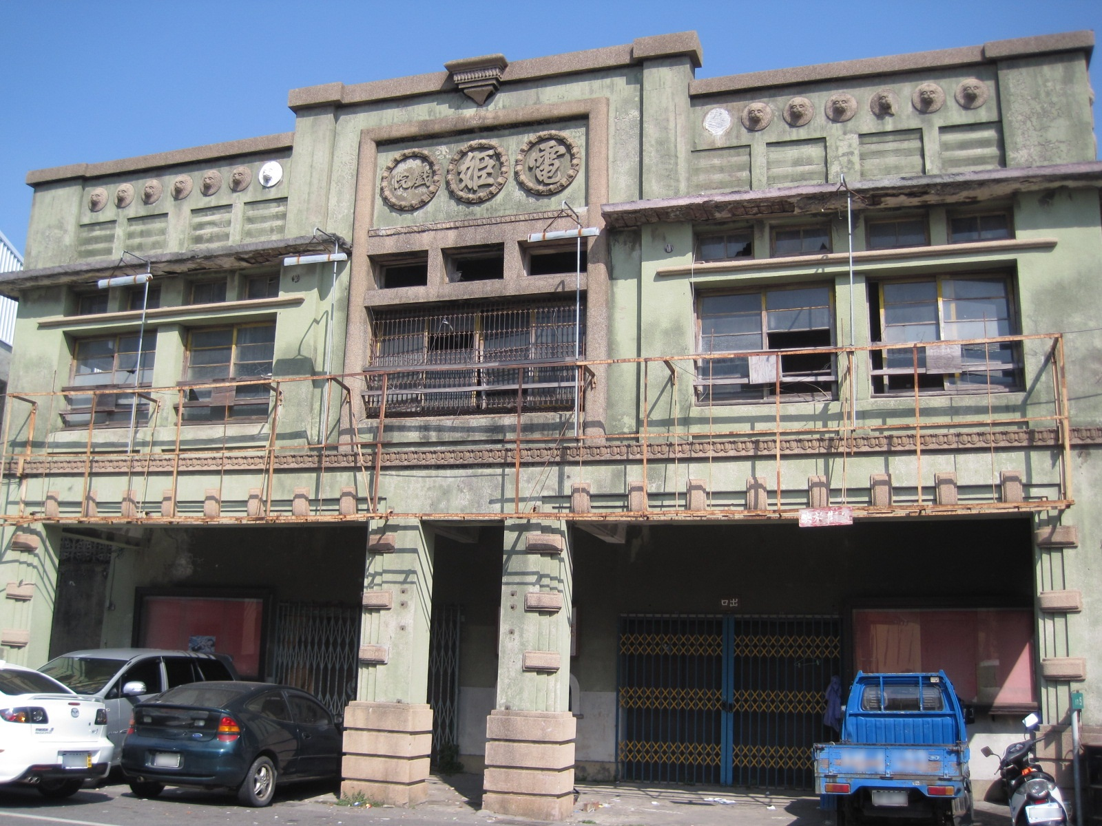 臺南麻豆電姬戲院。